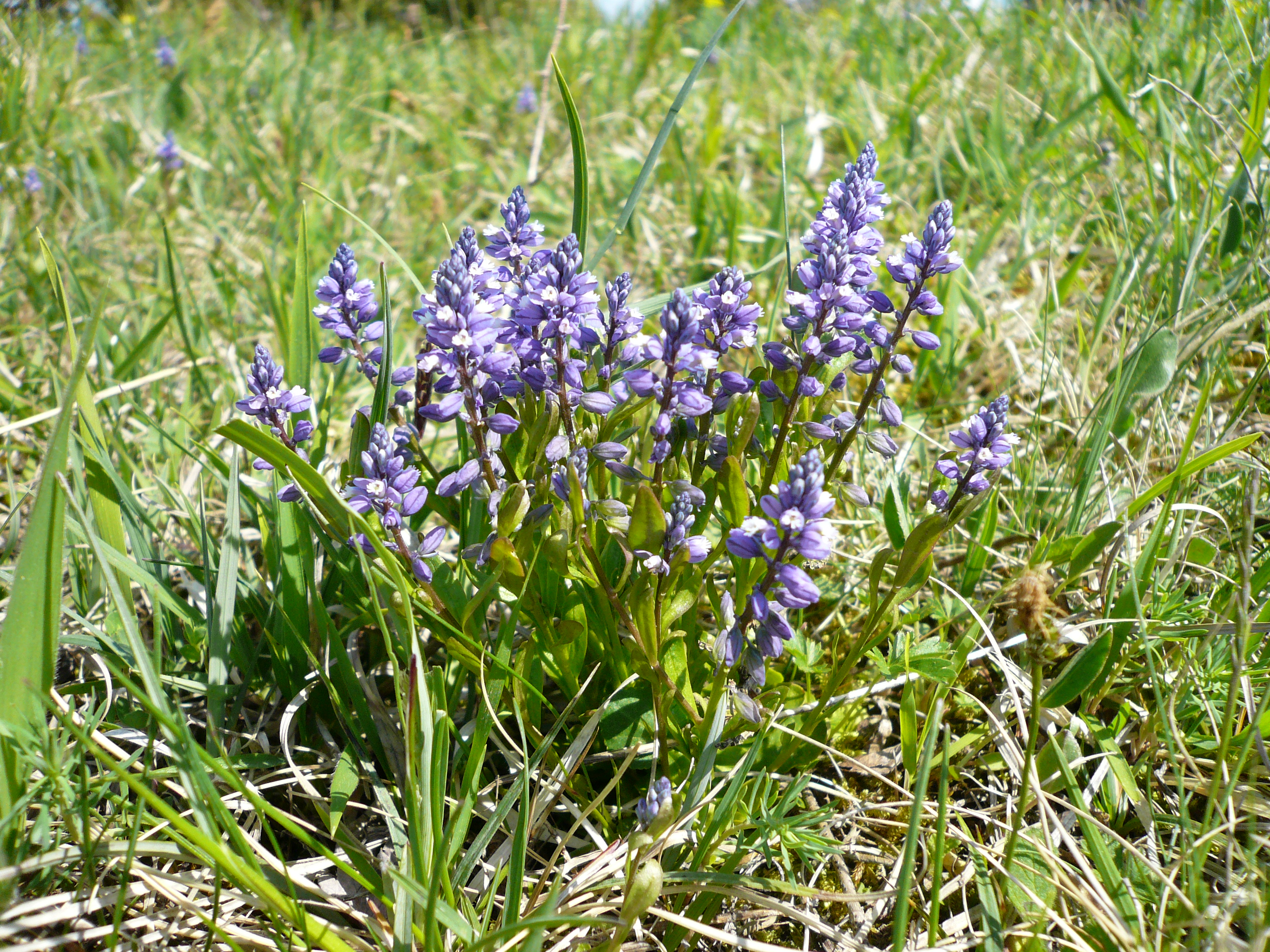 Kreuzblumen am Bühlchen, Hoher Meißner, Nordhessen